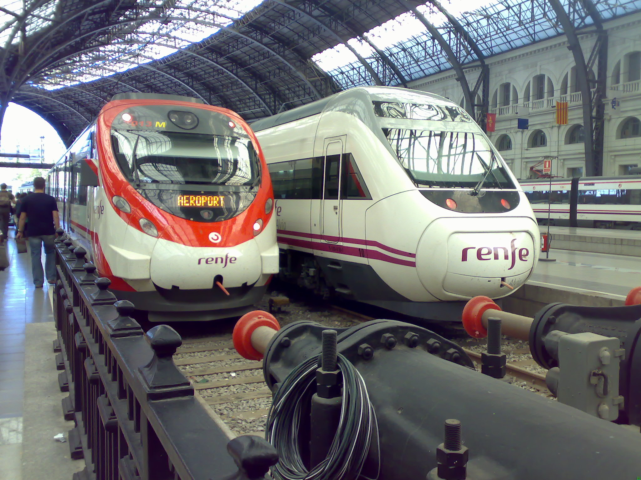 Züge im Bahnhof Barcelona-Estació França